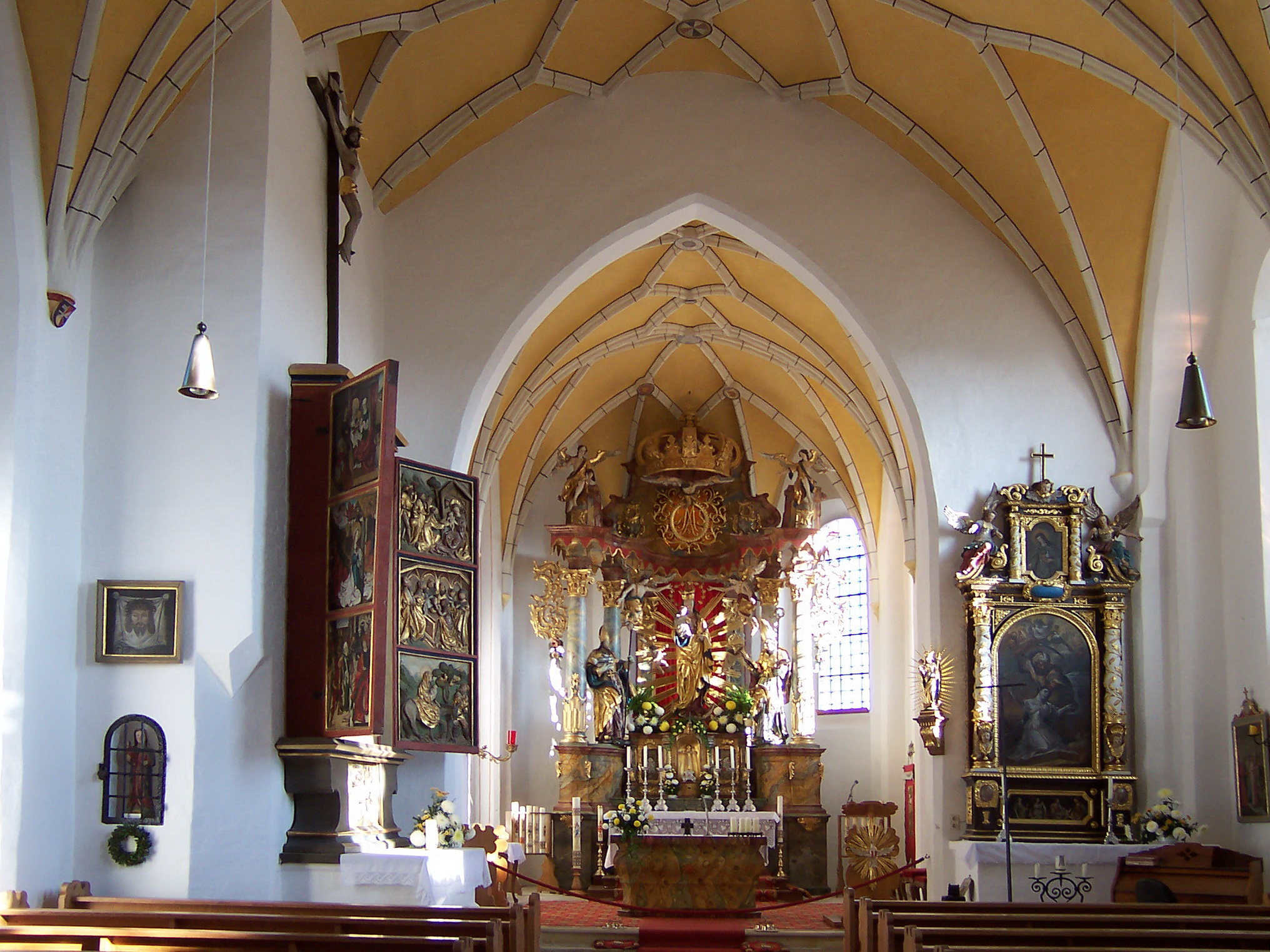 Landshut, Frauenberg 14. Katholische Kirche St. Mariä Heimsuchung. Einschiffiges Langhaus mit eingezogenem Chor und spätgotischen Netzrippengewölben. Mitte 15. Jahrhundert mit Ausstattung. Mariä Heimsuchung ist eine einschiffige Hallenkirche. Die Decken des Altarraumes und des Langhauses sind mit Netzgewölben versehen. Als Mitte der siebziger Jahre die Kirche restauriert wurde, fanden sich Renaissancewandmalereien.